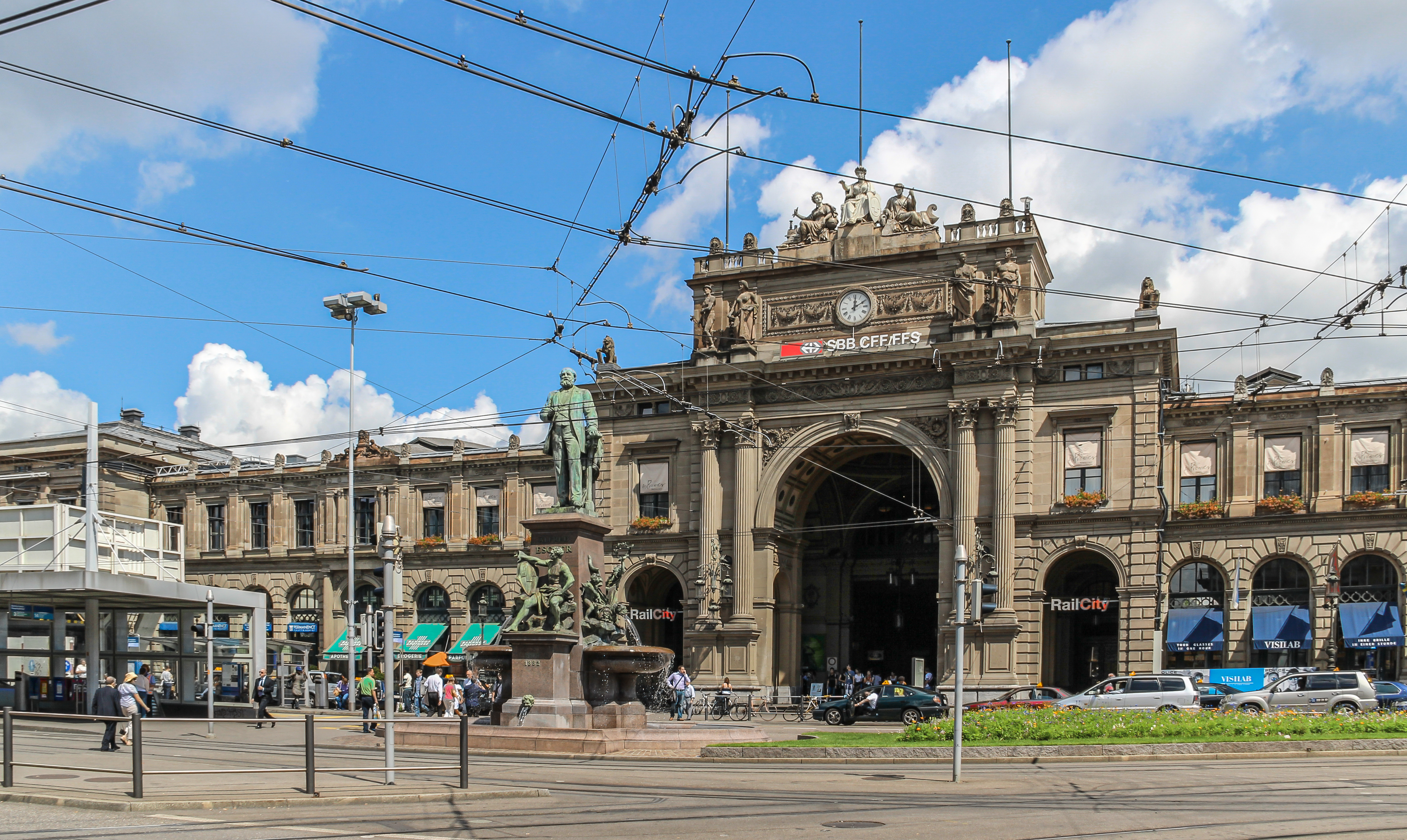 Bahnhof in Zürich, Schweiz